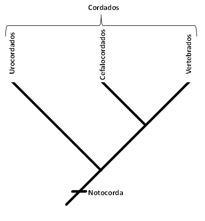 Cladograma cordados simplificado mostrando a origem da notocorda